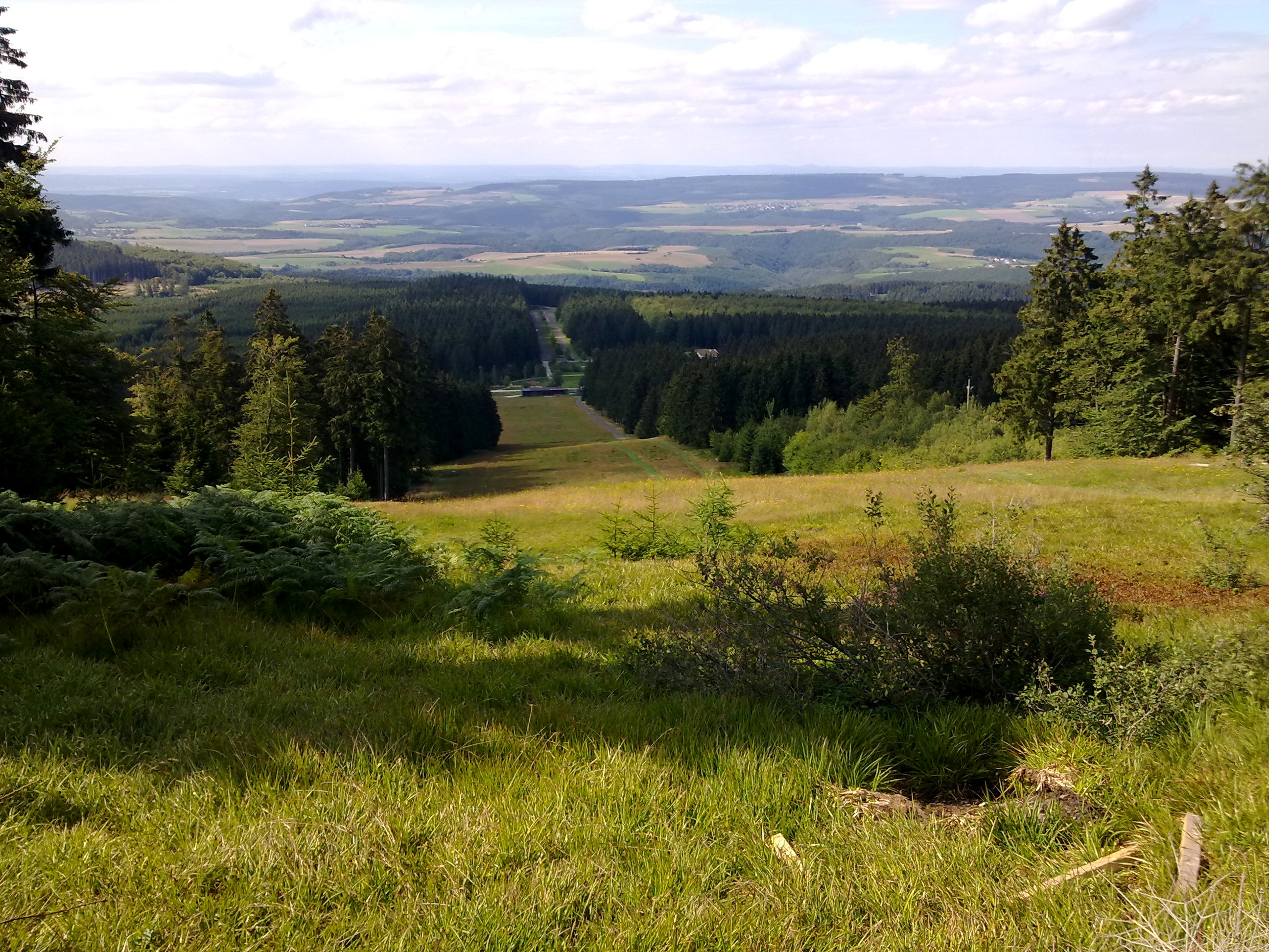 Blick vom Erbeskopf nach Norden